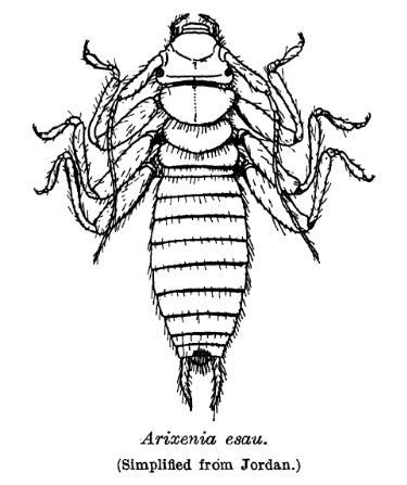 Arixenia esau, Earwig, Dermaptera